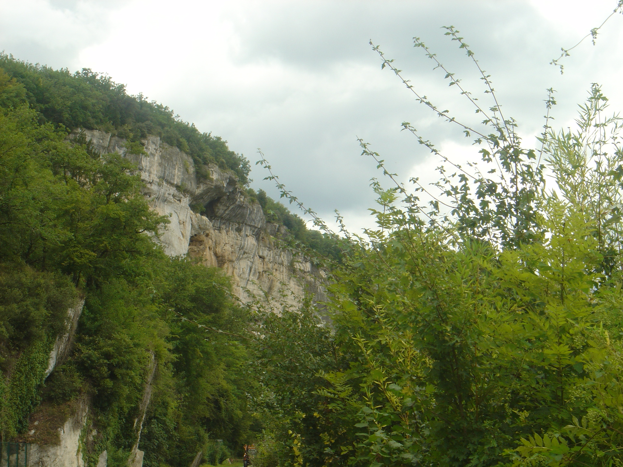 Laugerie haute, Vallée de la Vézère, Les Eyzies-de-Tayac-Sireuil, Dordogne, France